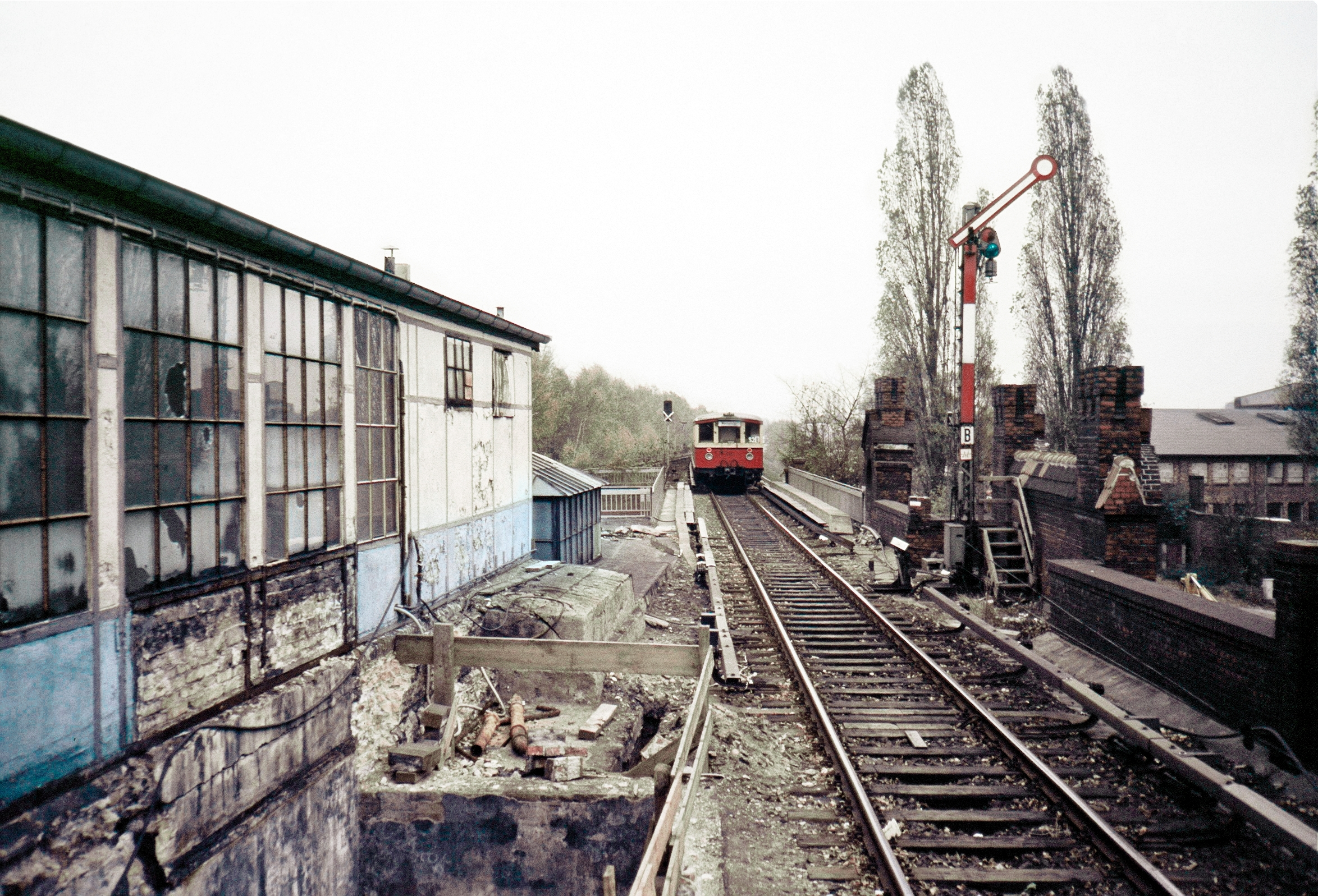 Südkopf Berlin Wilhelmsruh mit ausfahrendem BVG-Zug